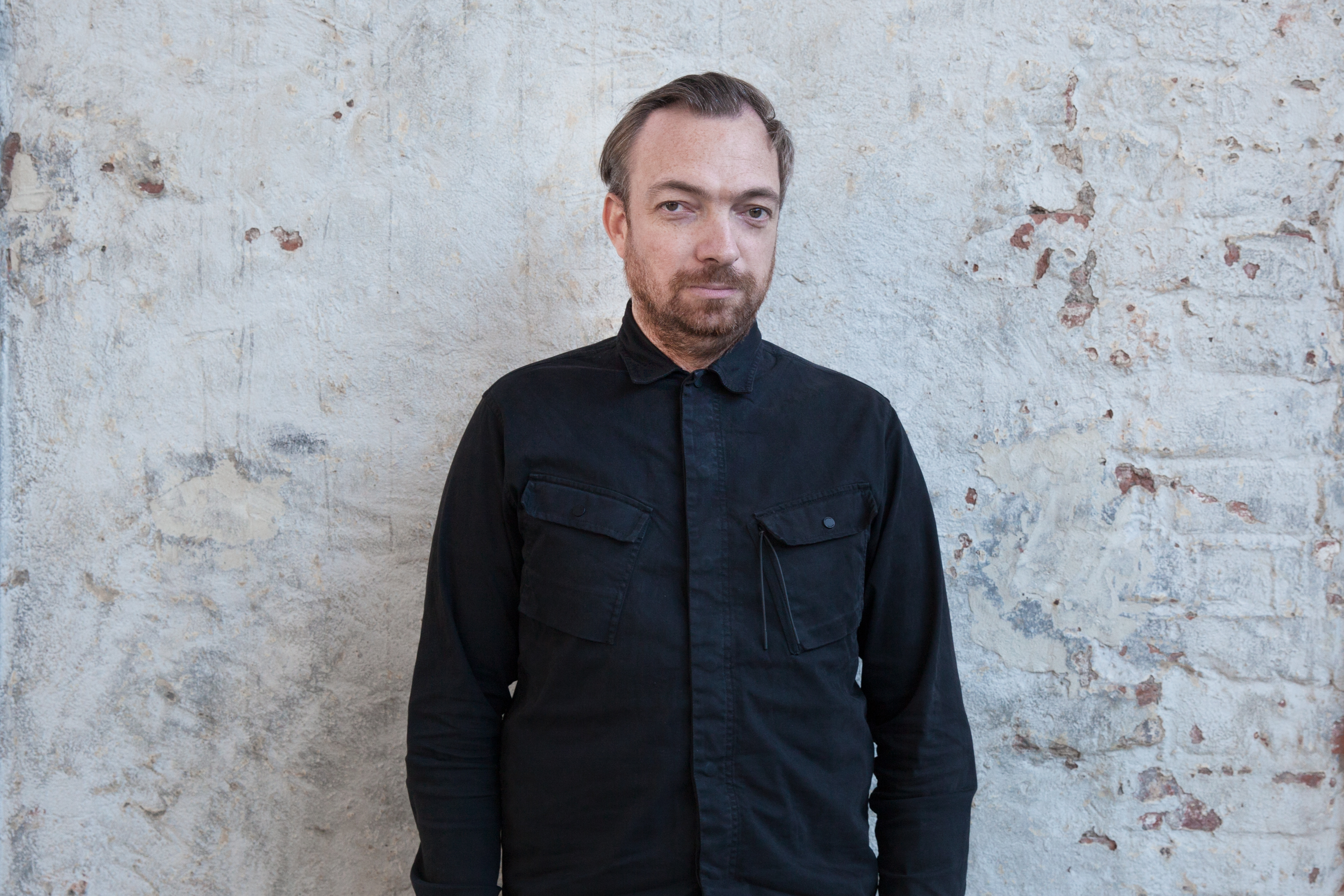 Photo by Ludmila Savelieva / Strelka institute